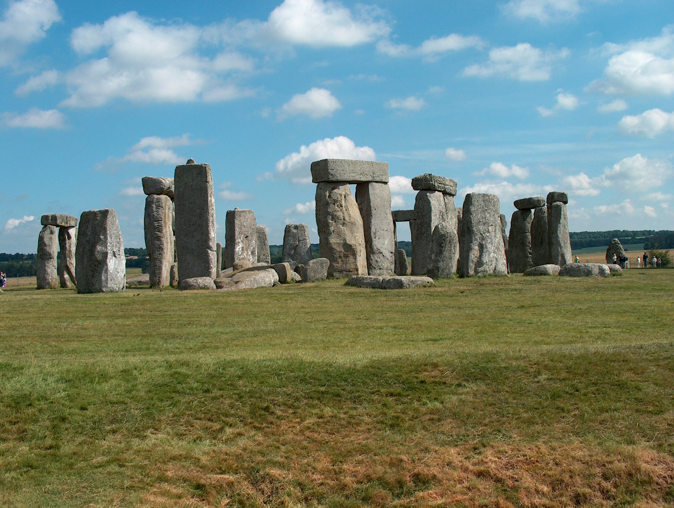 The Stones of Stonehenge--Der Steinkreis von Stonehenge.